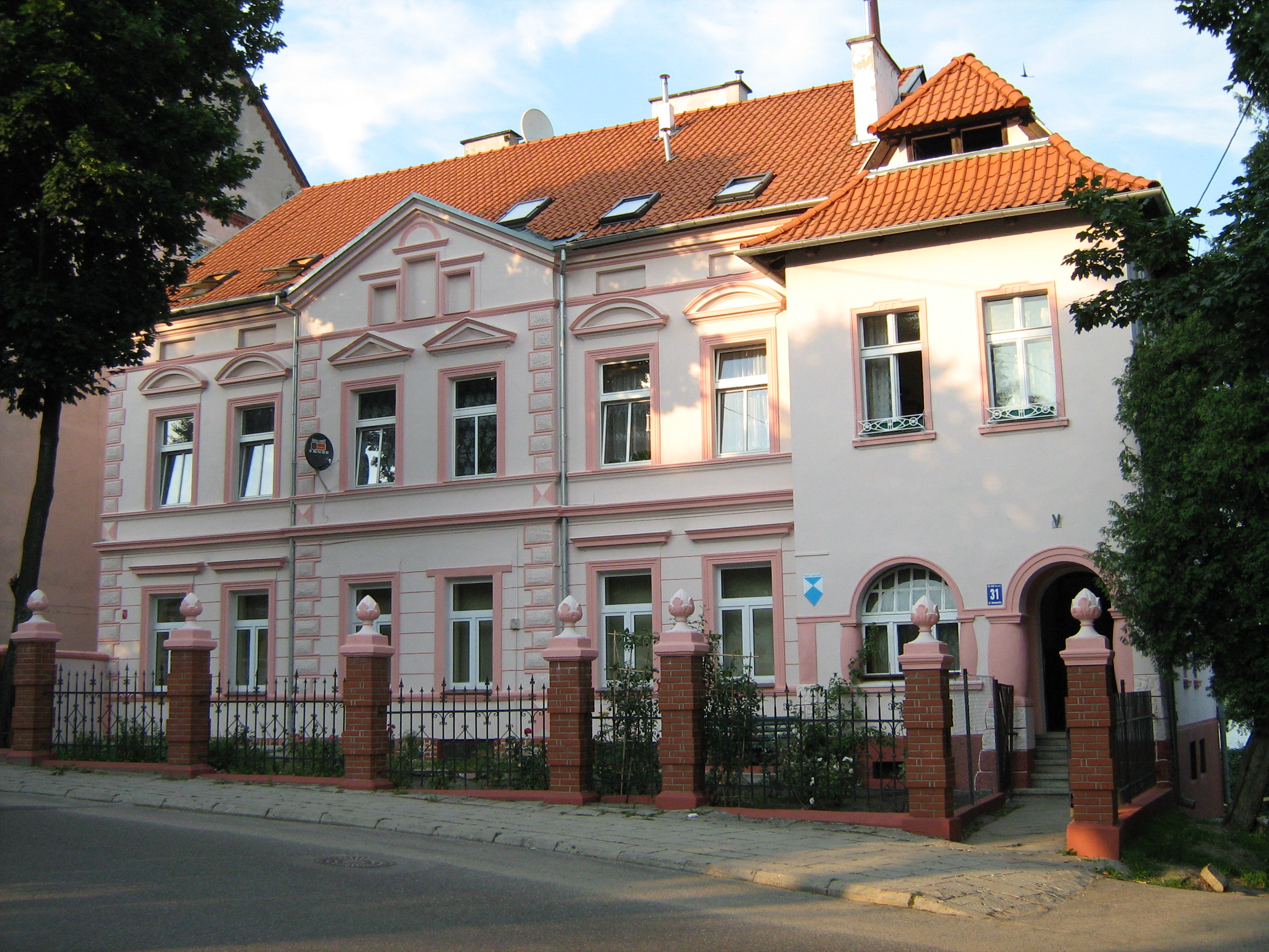 Mrągowo - zabytkowa kamienica przy ulicy F. Roosevelta 31 (objekt nie jest wpisany do rejestru zabytków)